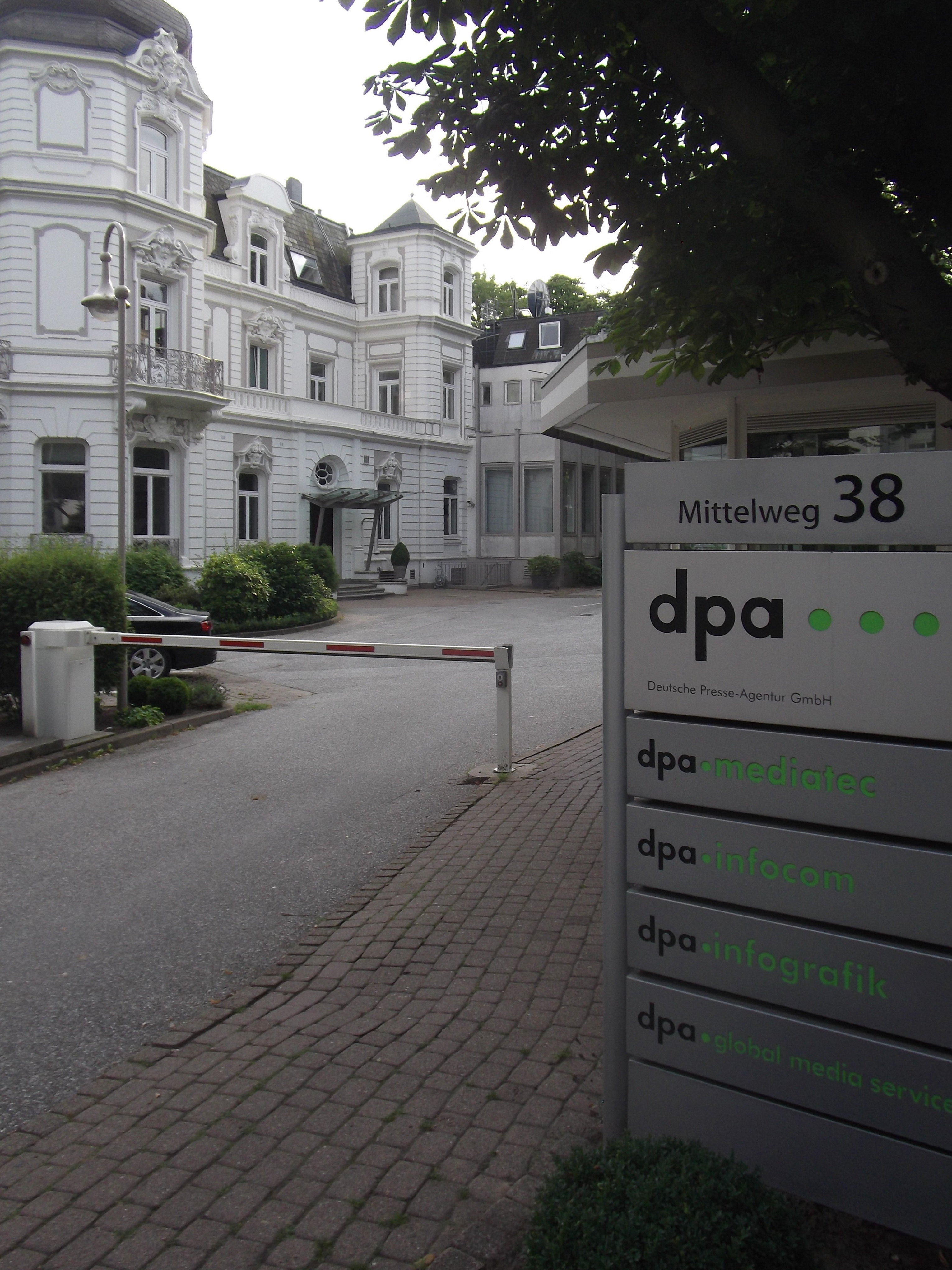 Hamburg, August 2015